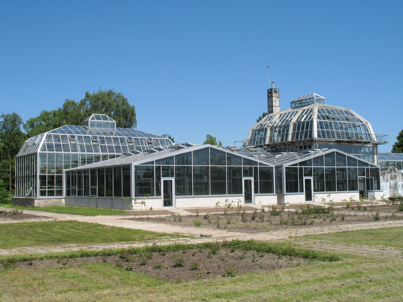 Kauno botanikos sodas.